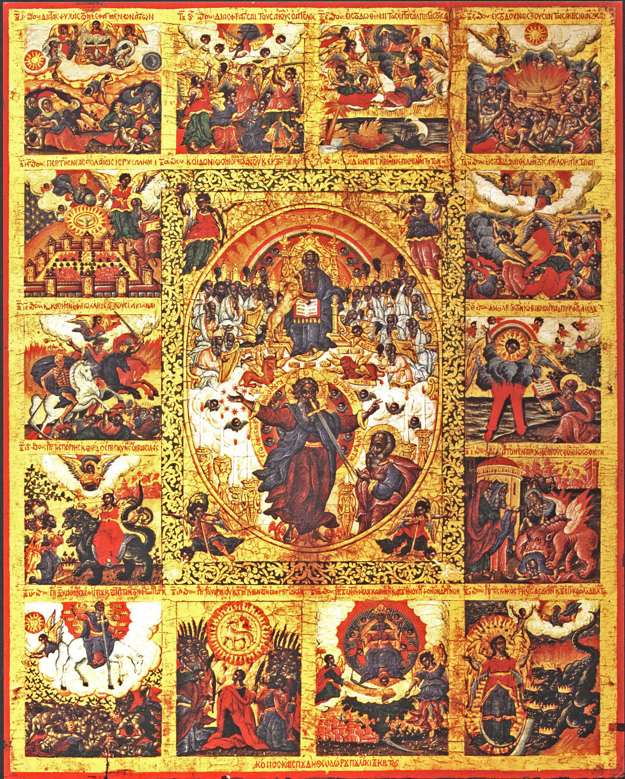 Монастырь Платитера. Икона "Второе Пришествие" (Страшный Суд). Приписывается работе Георгия Клодзаса, написана около 1600 г. Размер в оригинале: 90,8×106 см.